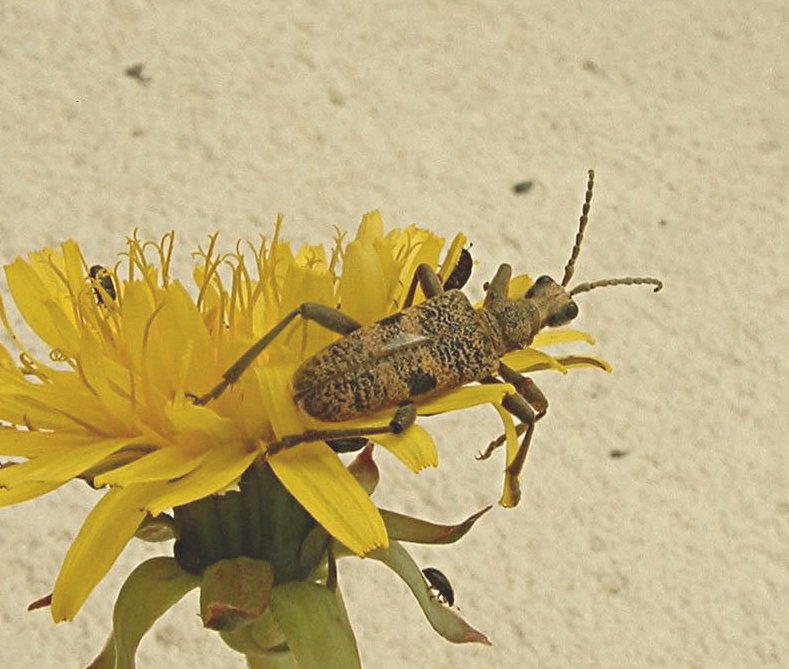 Rhagium mordax Photo by Jeffdelonge Vantoux et Longevelle 70700 France 17-04-2006